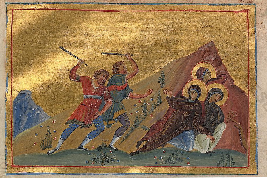 Мцц. Минодора, Митродора, Нимфодора. Константинополь. 985 г. Миниатюра Минология Василия II. Ватиканская библиотека. Рим.